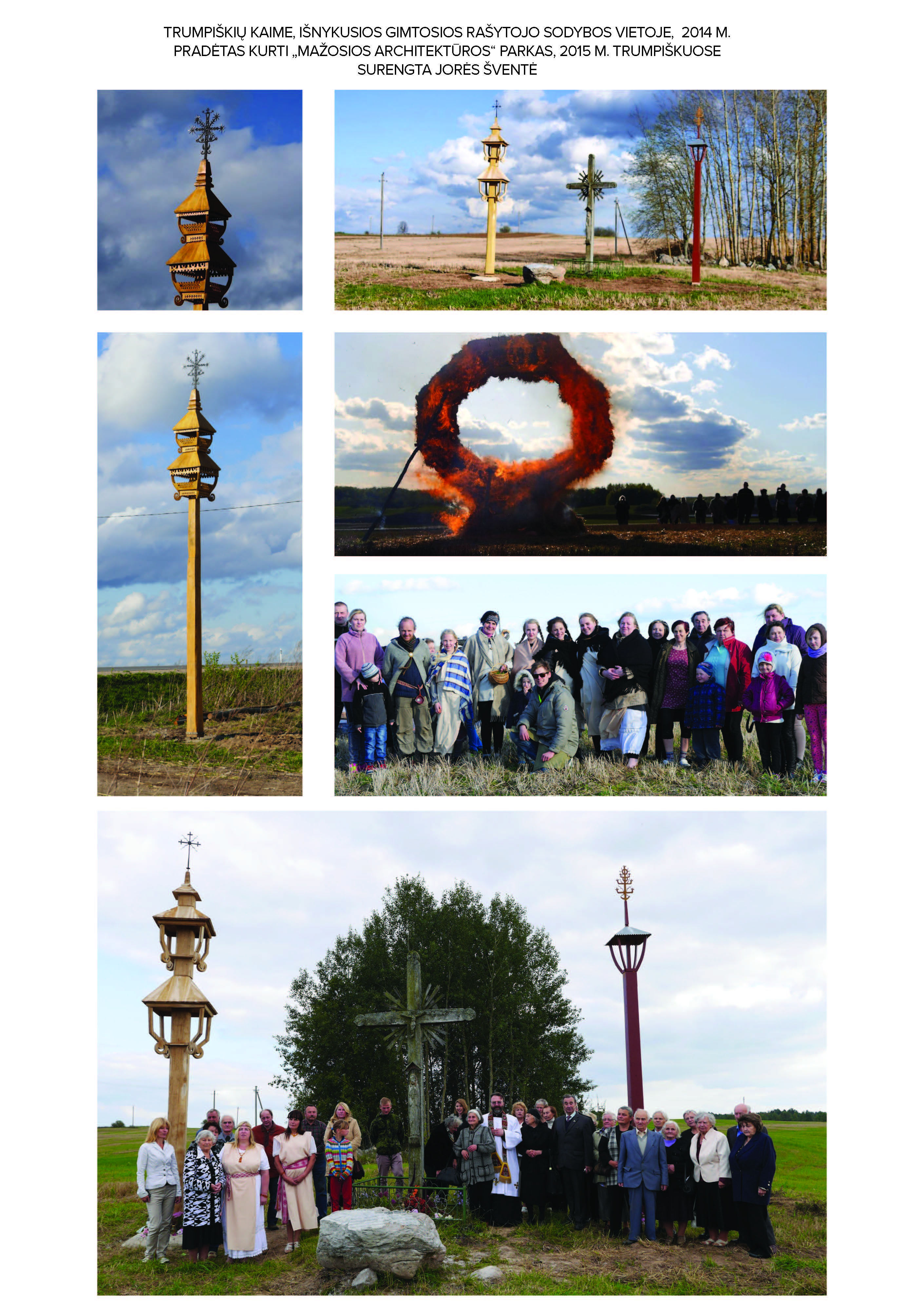 2014 metais anūkas Žilvinas Danys rašytojo gimtajame Trumpiškių kaime pradėjo kurti lietuviškos mažosios architektūros parką, skirtą Rašytojui Alfonsui Daniui ir jo broliui gydytojui Jurgiui Daniui atminti